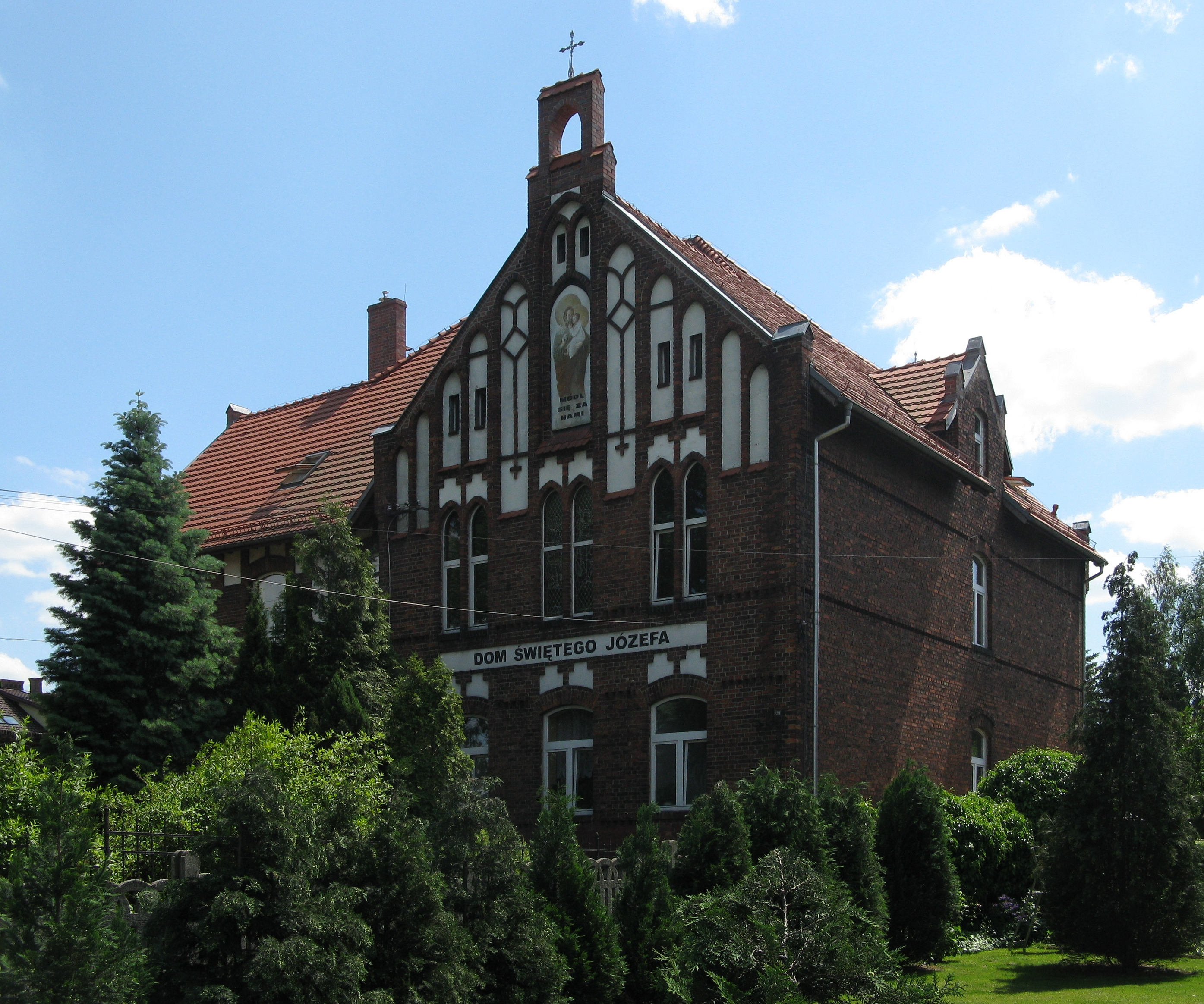 Zabytkowy budynek Zakładu św. Józefa, Piekary Śląskie.